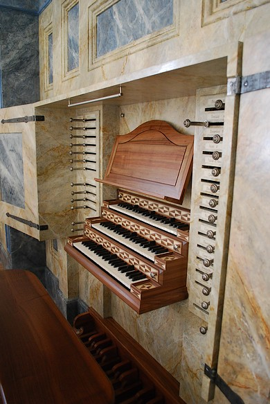 Console de l'orgue de l'abbatiale de Bellelay (reconstruction Kuhn selon J. Bossart, 1665-1748)